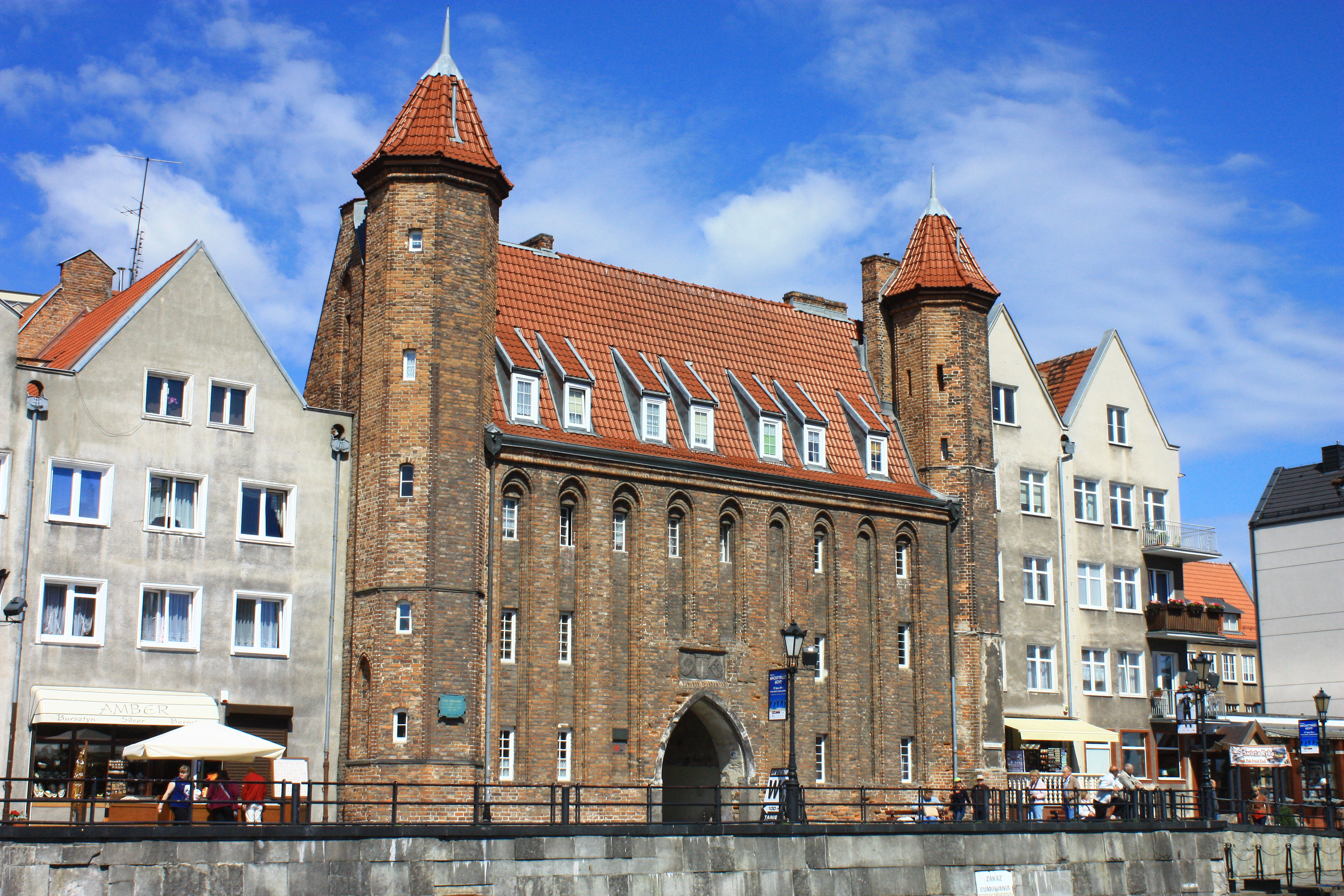 Gdańsk, Brama Straganiarska, XIV, XVII